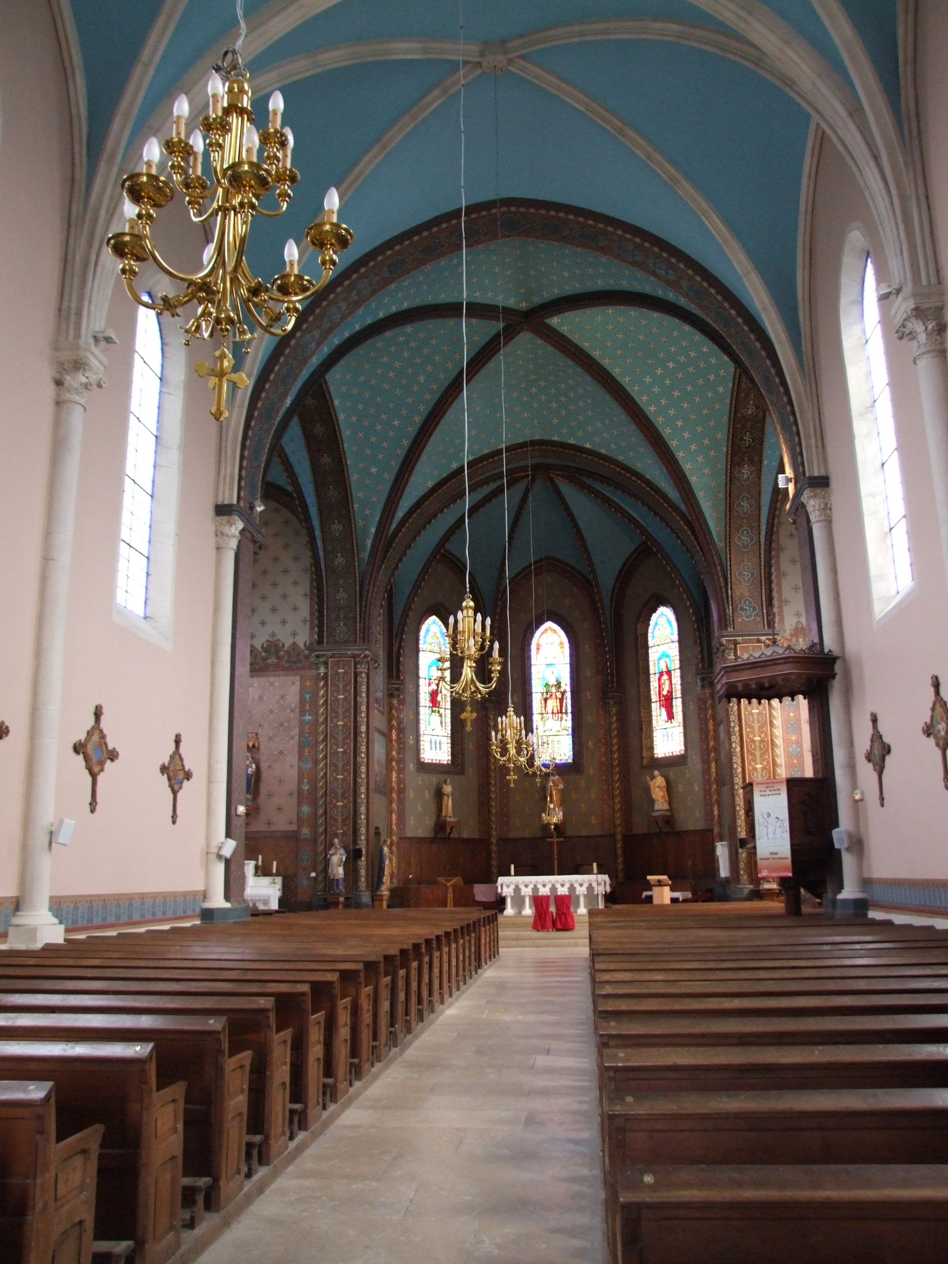 Église Saint-Laurent de Beire-le-Châtel, Beire-le-Châtel, Côte-d'Or, Bourgogne, FRANCE